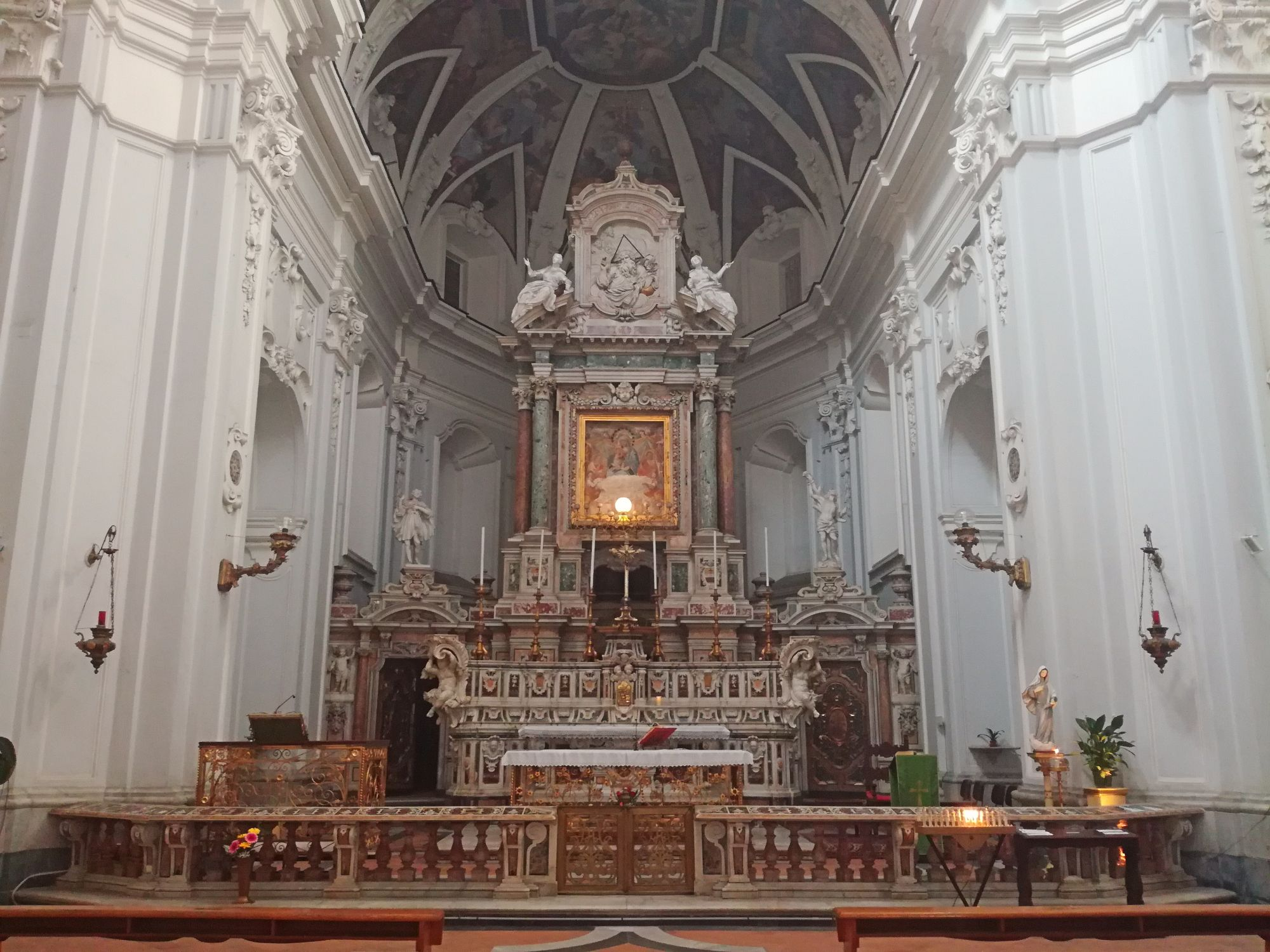 chiesa di santa maria di costantinopoli (napoli)